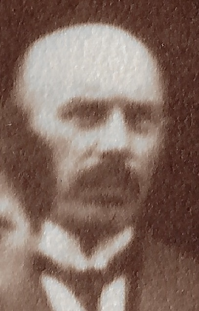 Portrait von Georg Wagner im Jahr 1916 beim Besuch seines Geburtsortes Obertiefenbach (heute Beselich)